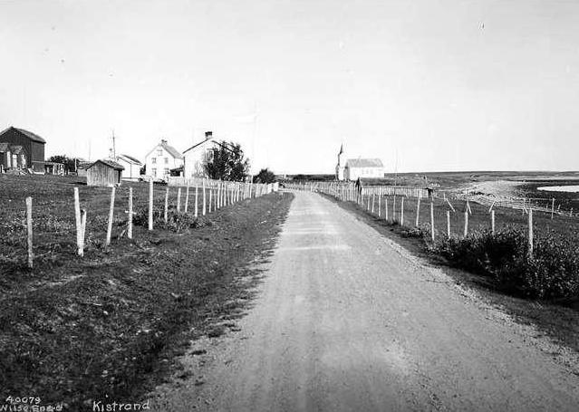 Kistrand med Kistrand kyrkje. Arkitekt for kyrkja var Chr. H. Grosch